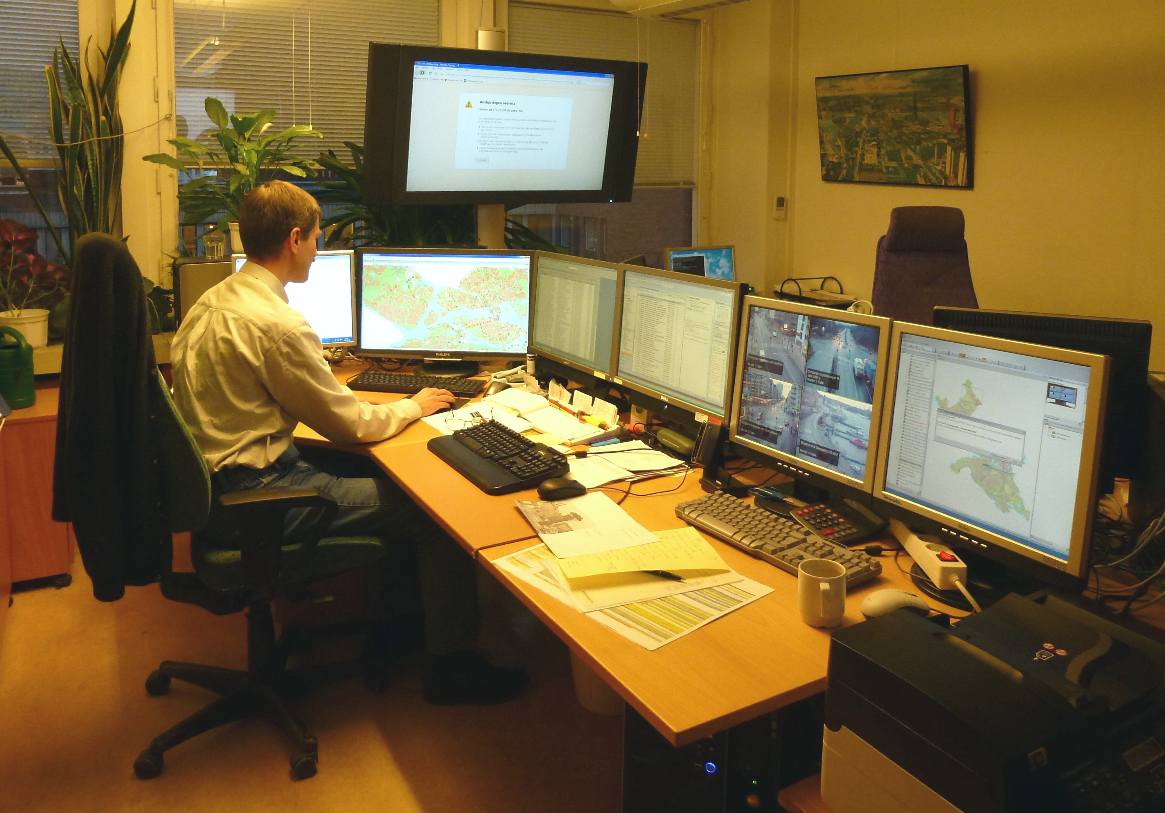 Trafikkontorets ledningscentral 2012